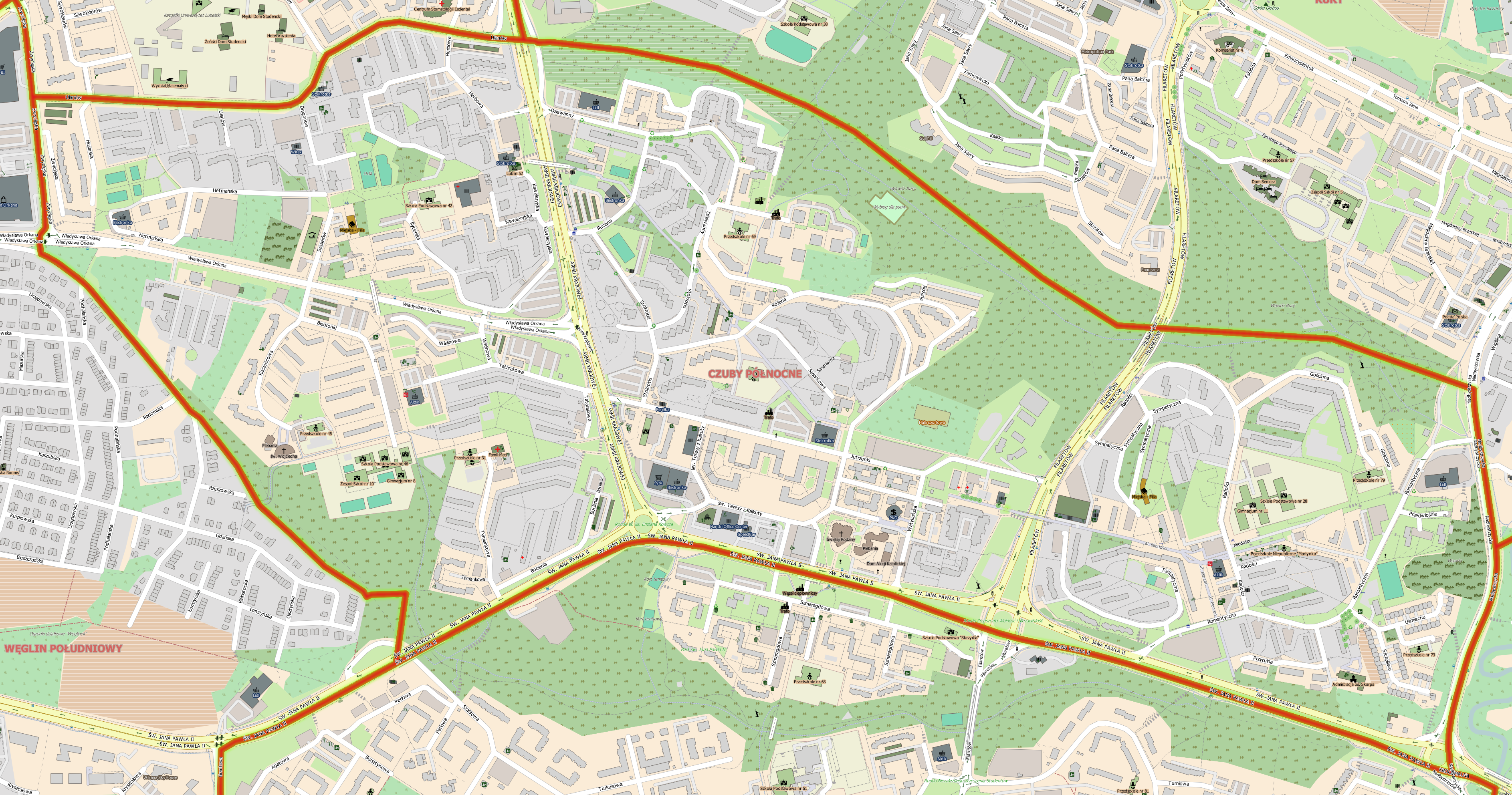 Plan dzielnicy Czuby Północne w Lublinie.